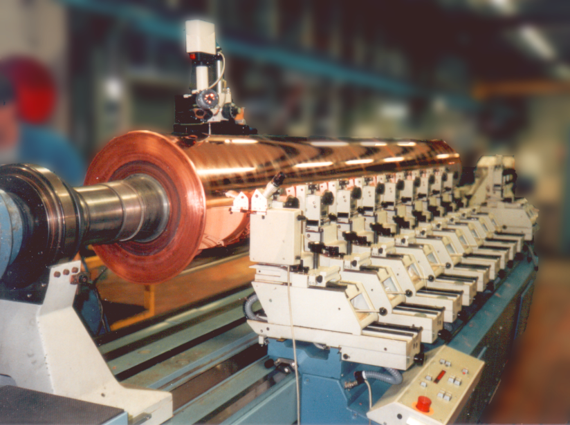 photo perso scannée et modifiée avec le logiciel GIMP.